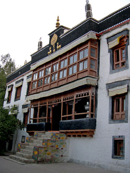 Leh. Gompa de Samkar (Ladakh, Índia)